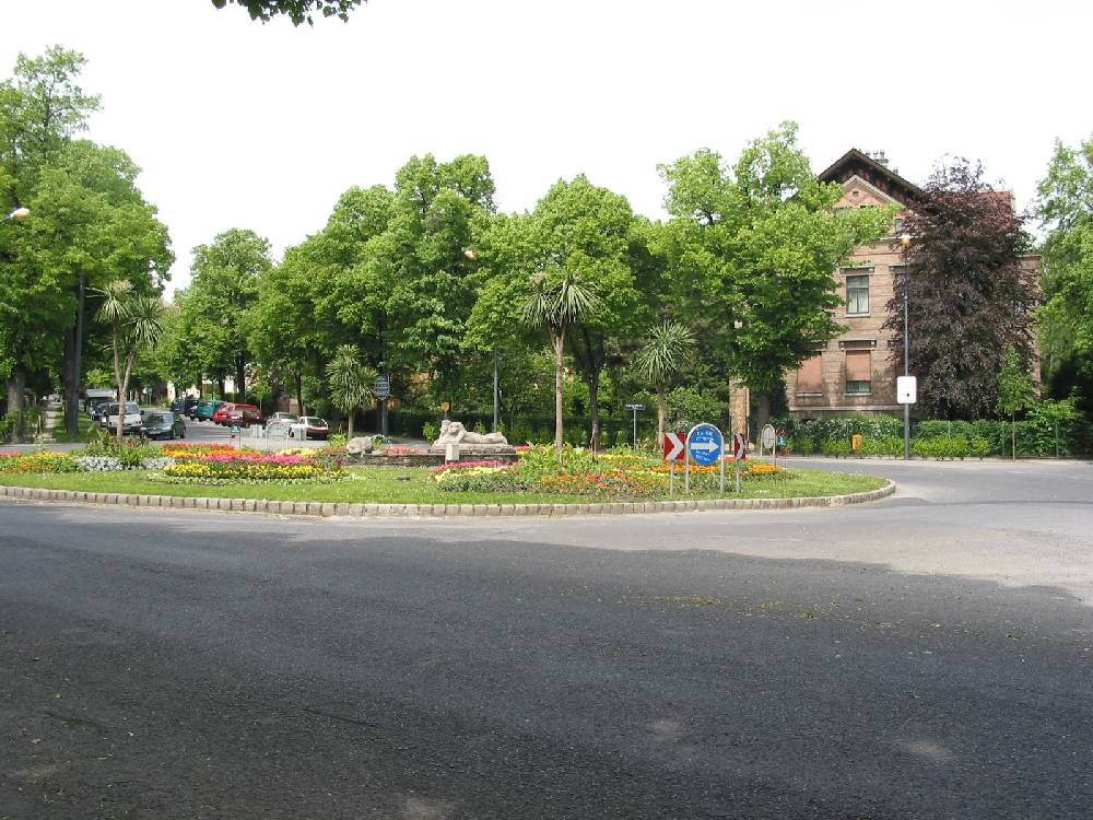 Richard Kralik-Platz in Wien (eigenes Foto); in der Mitte des Platzes eine Skulptur von Robert Ullmann (Original text: Foto Richard-Kralik-Platz 14.5.2005)